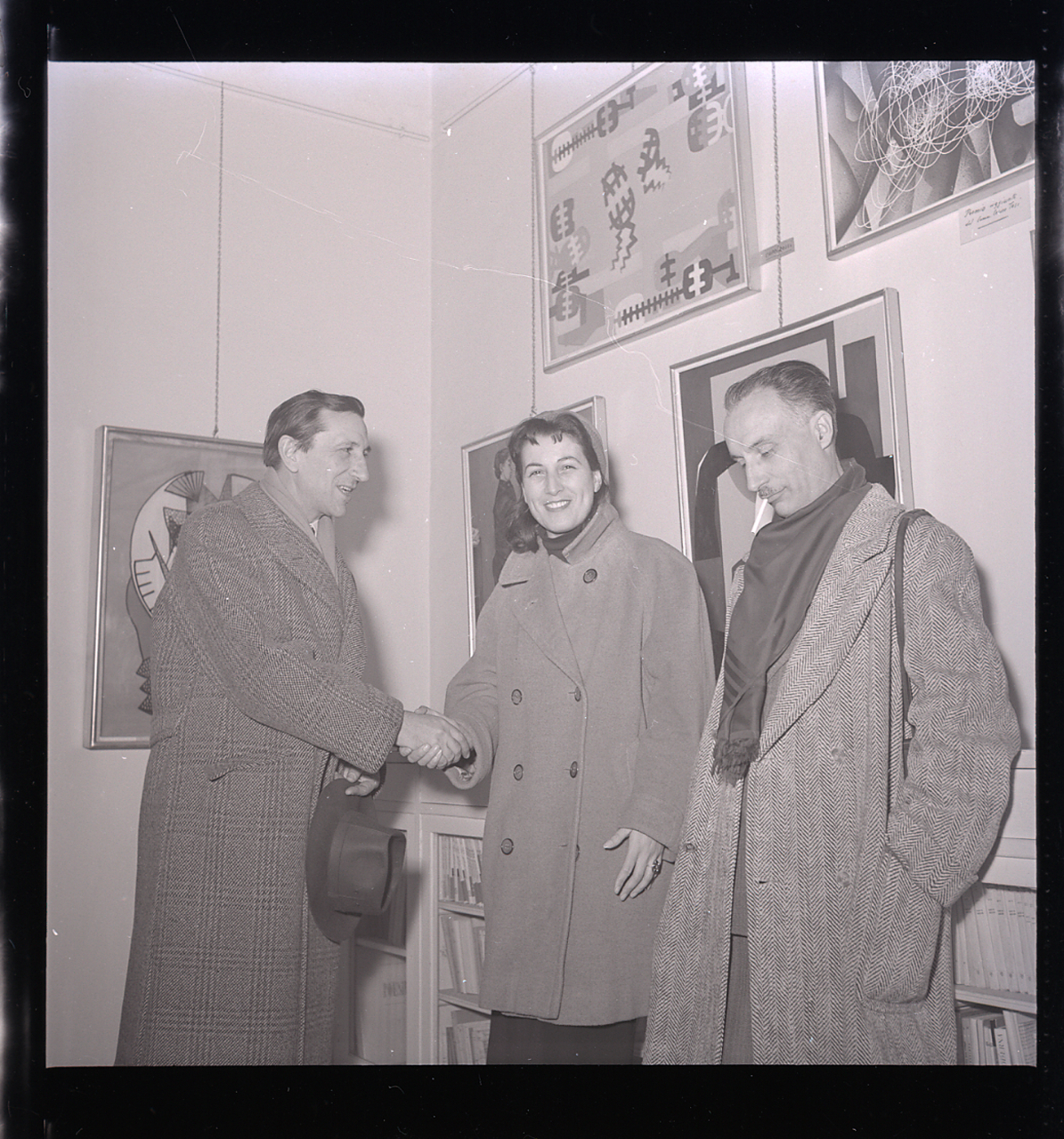 Venezia, Galleria del Cavallino? IV Premio Graziano 1954 [tema dell'autoritratto], 1955. Interni. Ritratti di artisti nonidentificati insieme al gallerista Carlo Cardazzo. Servizio fotografico : Venezia, 1955 / Paolo Monti. - Buste: 1, Fototipi: 20 : Negativo b/n, gelatina bromuro d'argento/ pellicola ; 6x6. - ((Serie costituita da 1 portanegativi contenente 20 negativi identificati con i nn.: 16349, 16350, 16351, 16352, 16353, 16354, 16355, 16356, 16357, 16358, 16359, 16360, 16361, 16362, 16363, 16364, 16365, 16366, 16367, 16368. - I negativi (7 strisce) non sono identificabili singolarmente. - Il portanegativi è conservato insieme ad altri due contenitori (di cui uno con iscrizione didascalica manoscritta al recto del contenitore - "Premio/ Graziano/ 1954/ 'Autoritratti' ". - La suddetta serie è contenuta nella scatola R16017-16406 e identificata con l'iscrizione didascalica manoscritta a pennarello nero: "Artisti". - Alla Galleria del Cavallino l'esposizione del Premio Graziano si tenne dal 22 gennaio al 3 febbraio del 1955. - Occasione: Documentazione del IV Premio Graziano 1954, 1955